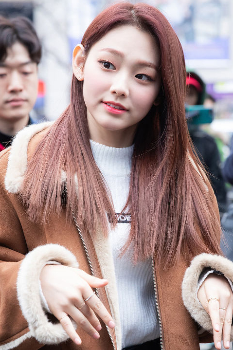 Kang Mi-na no Music Bank, em 21 de dezembro de 2018